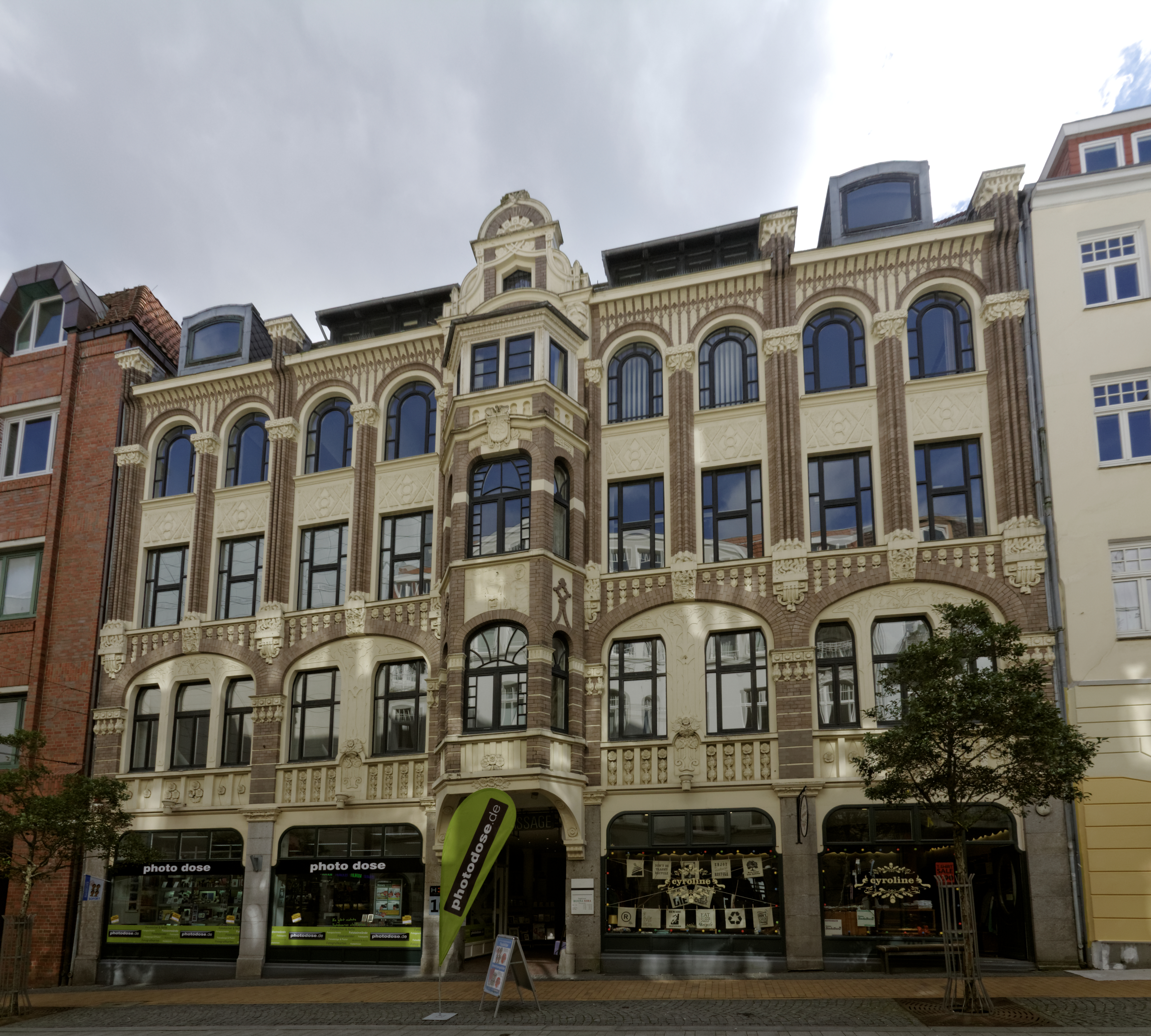 Flensburg, Nikolaistr. 10